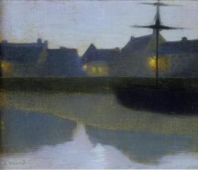 Crépuscule sur le canal